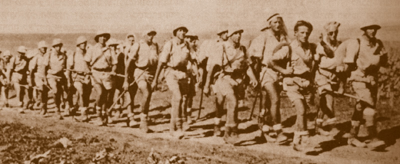 המחלקה הגרמנית של ההגנה באימון 1942 ארכיון ההגנה